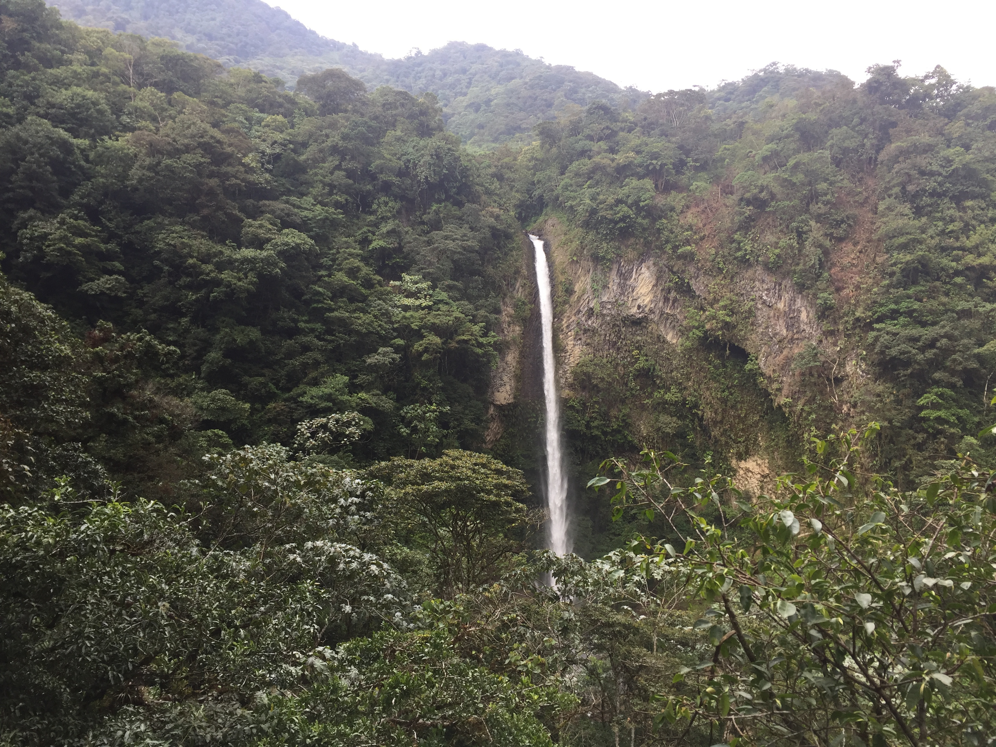 Machay-Wasserfall im Megadiversitätszentrum Anden-Osthänge, Pastaza, Ecuador